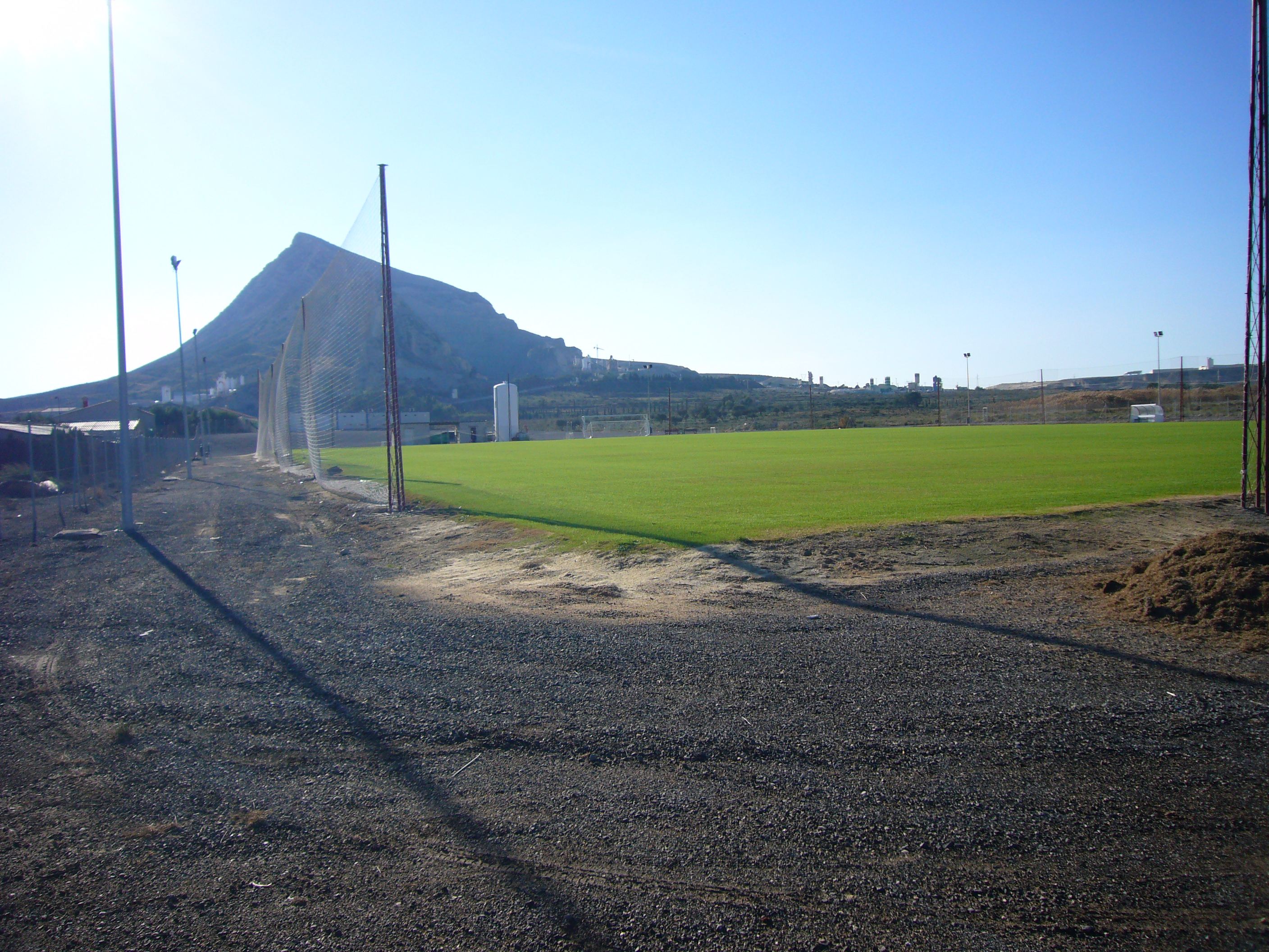 Campo de Entrenamiento del Hércules Club de Fútbol en la partida rural de Fontcalent (Alicante).